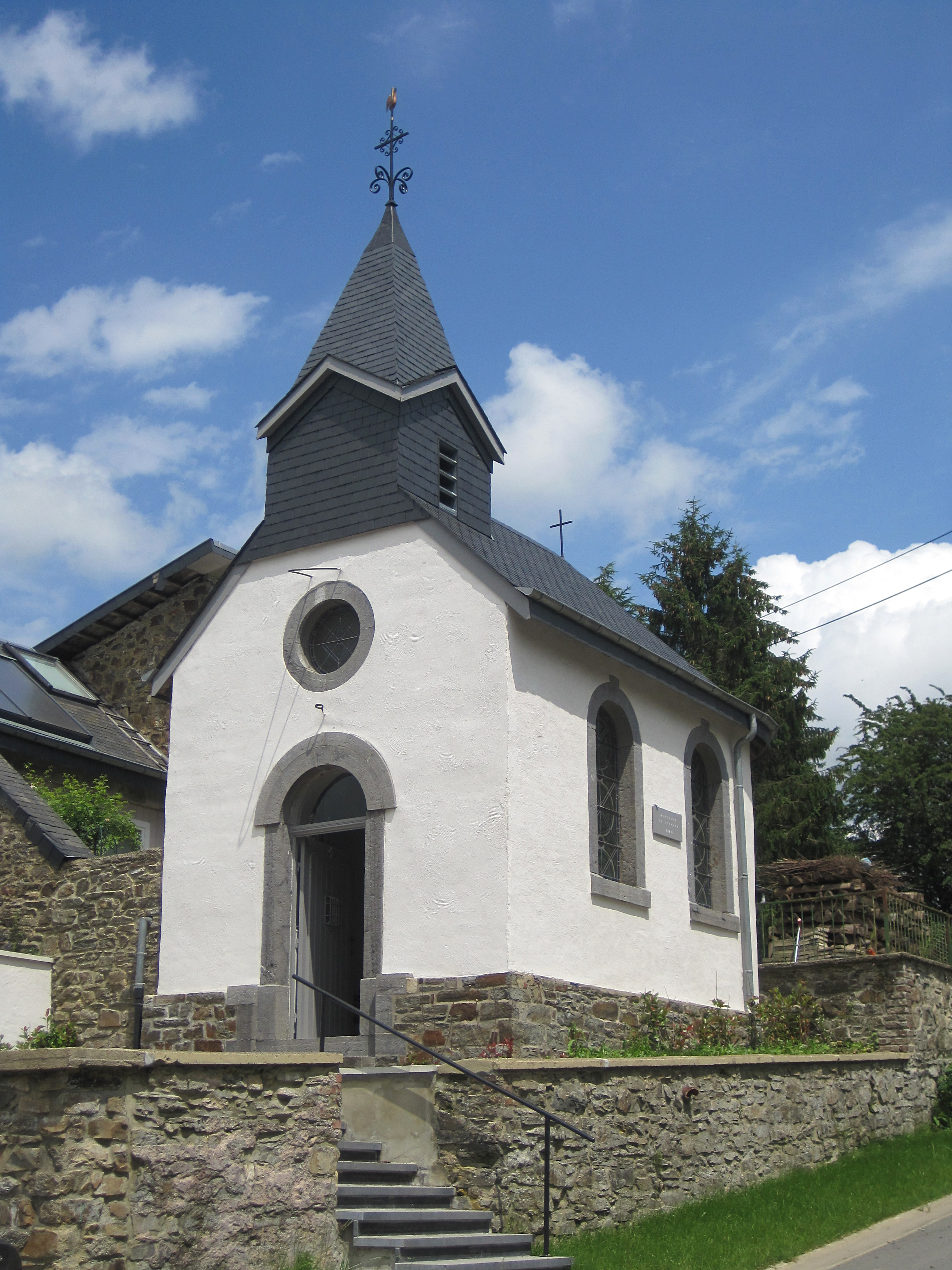 Rondu (Belgique), la chapelle Saint-Antoine - Montagne Saint-Antoine (508m).